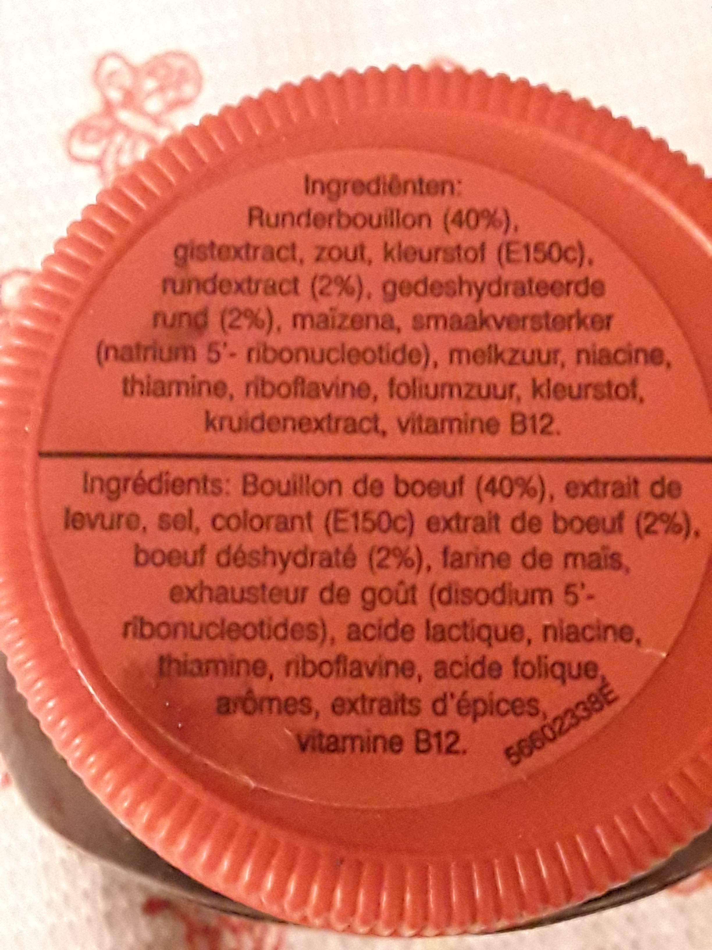 Bovril